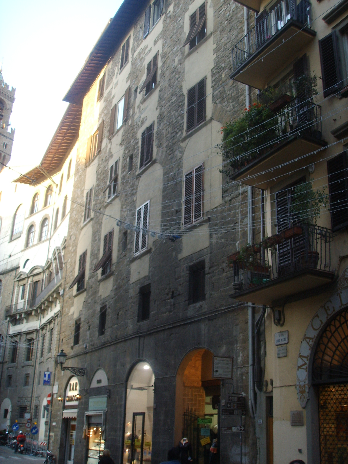 Torre degli Filipetri in Florence, Italy